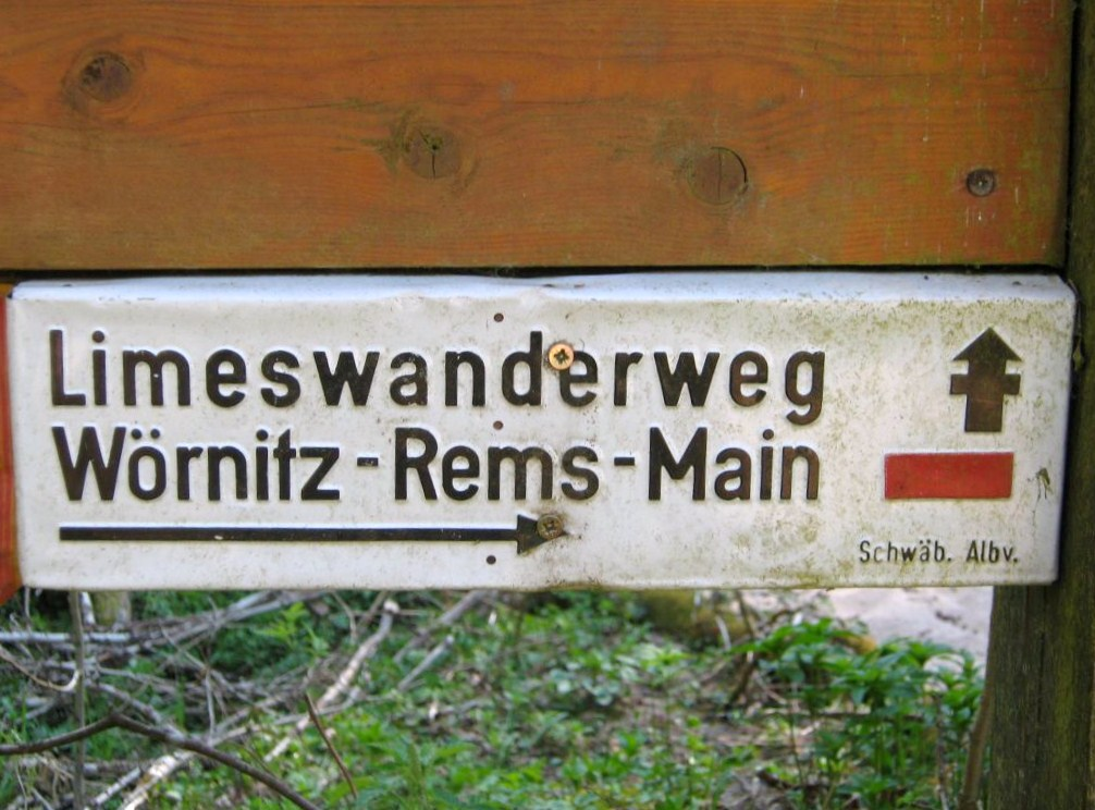 Beschilderung des Limes-Wanderwegs